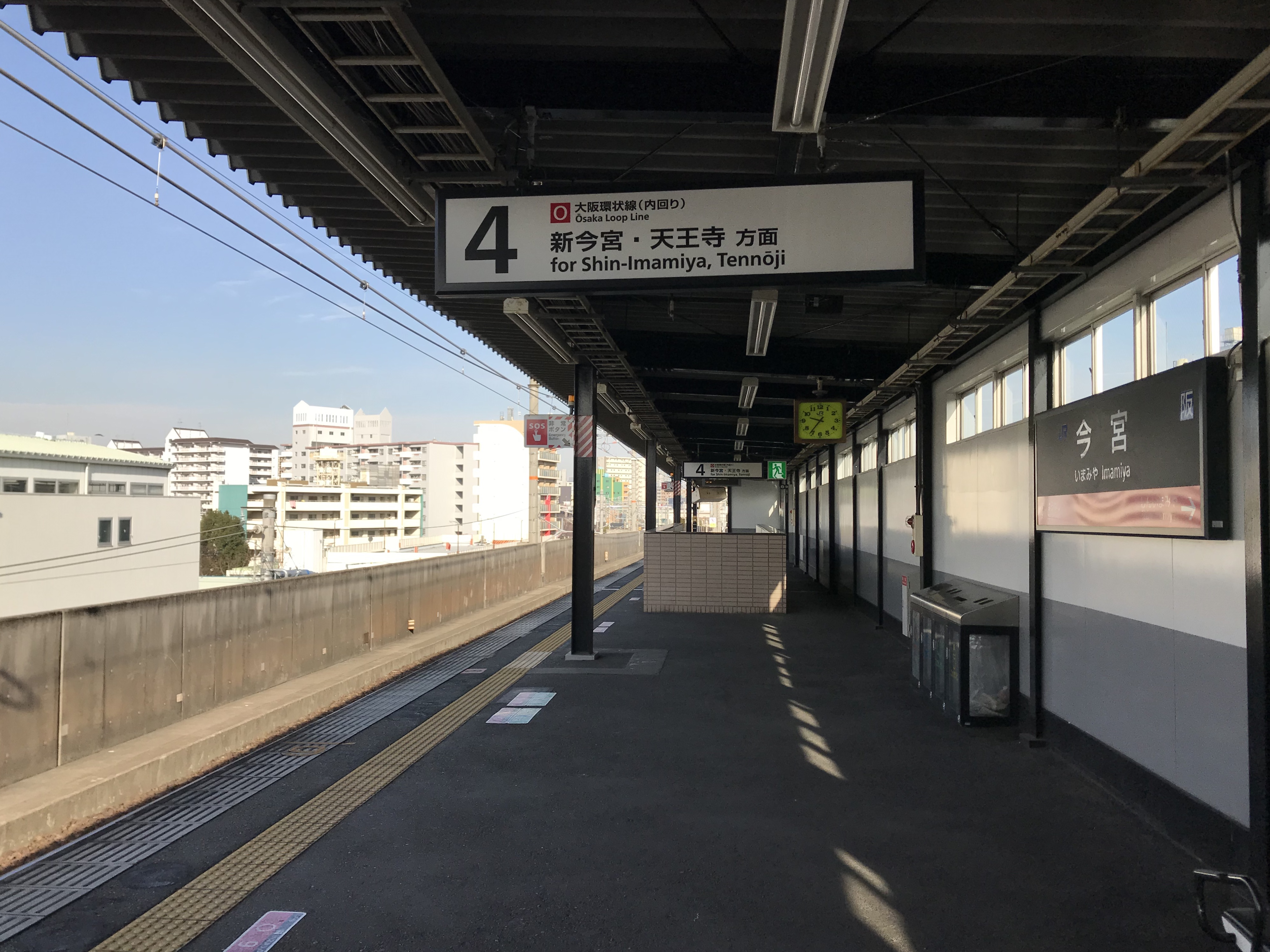 今宮駅の大阪環状線ホーム(奥は芦原橋方面)